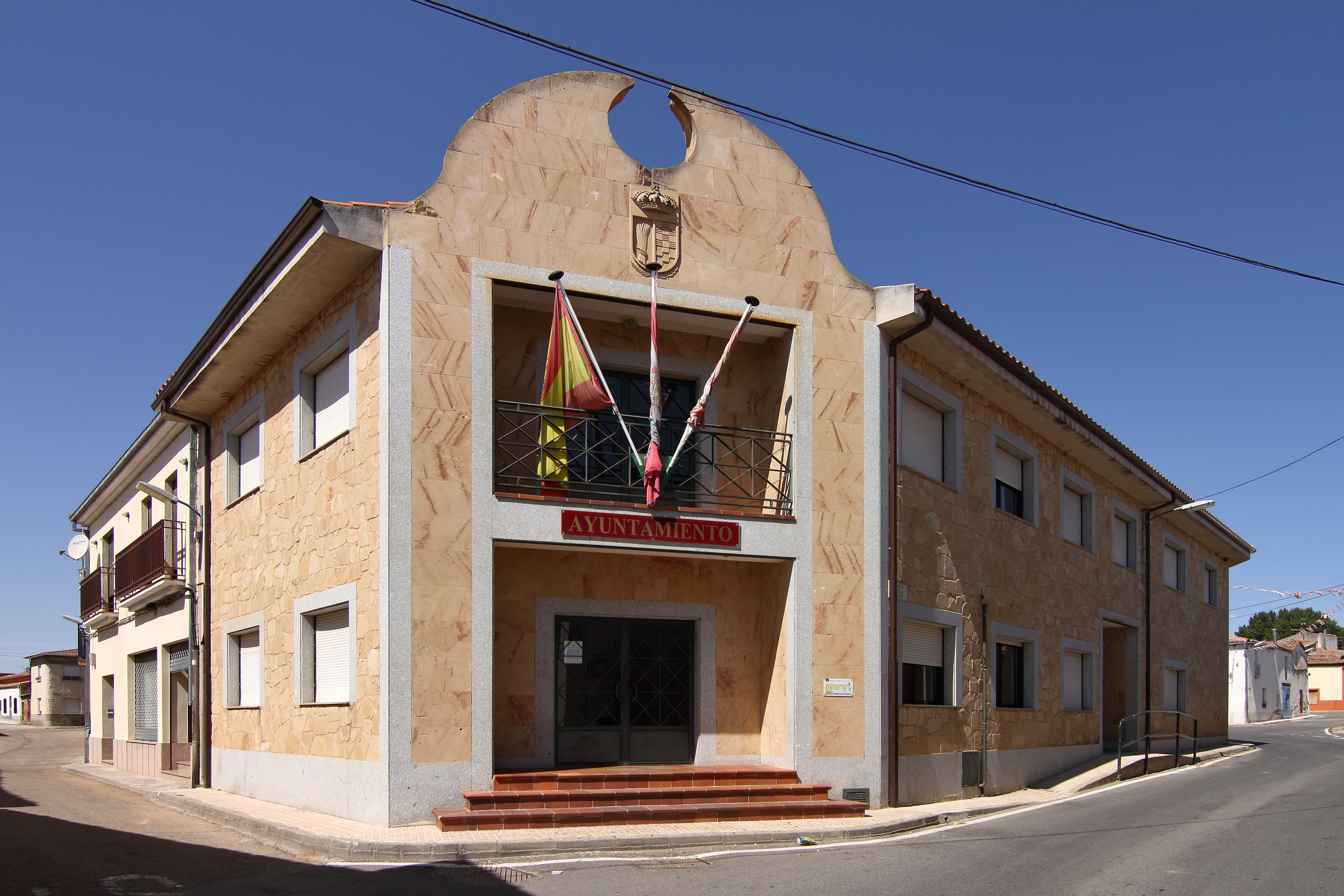 Ayuntamiento de Villoruela